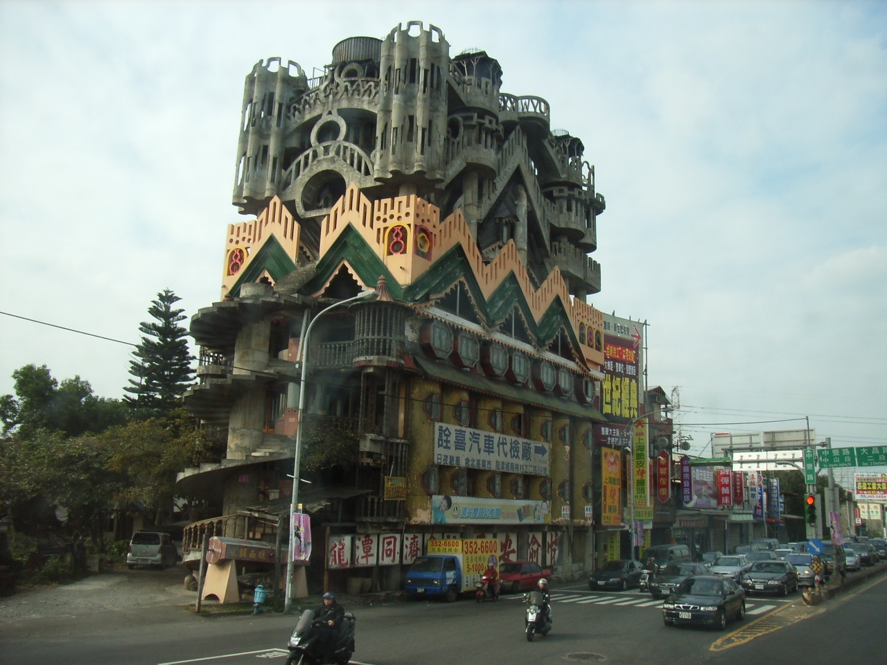 臺灣桃園縣龍潭鄉中豐公路旁的葉山樓，被稱為龍潭鬼屋。(攝者:TWOCHSE)